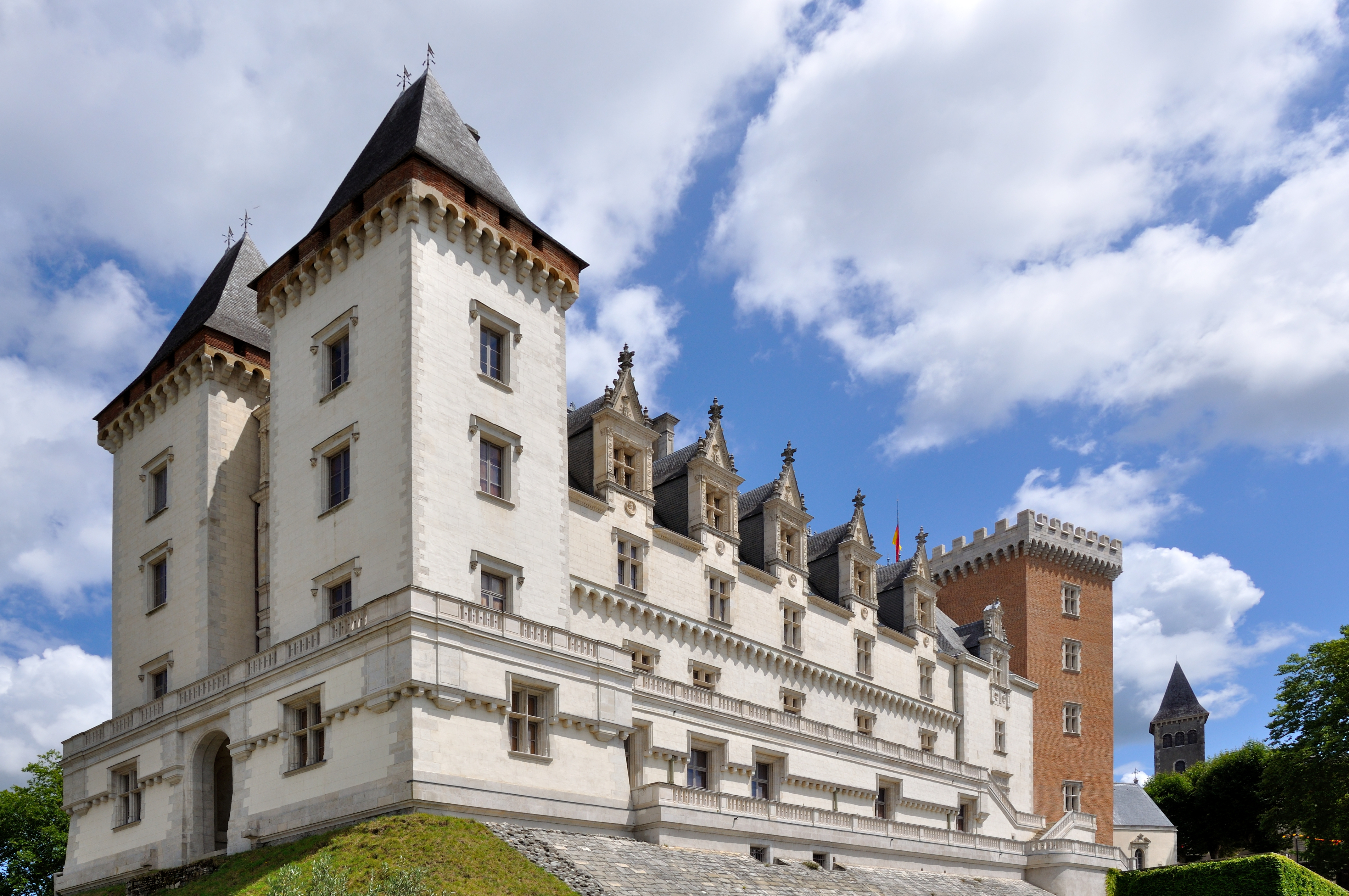 Vue du château de Pau .